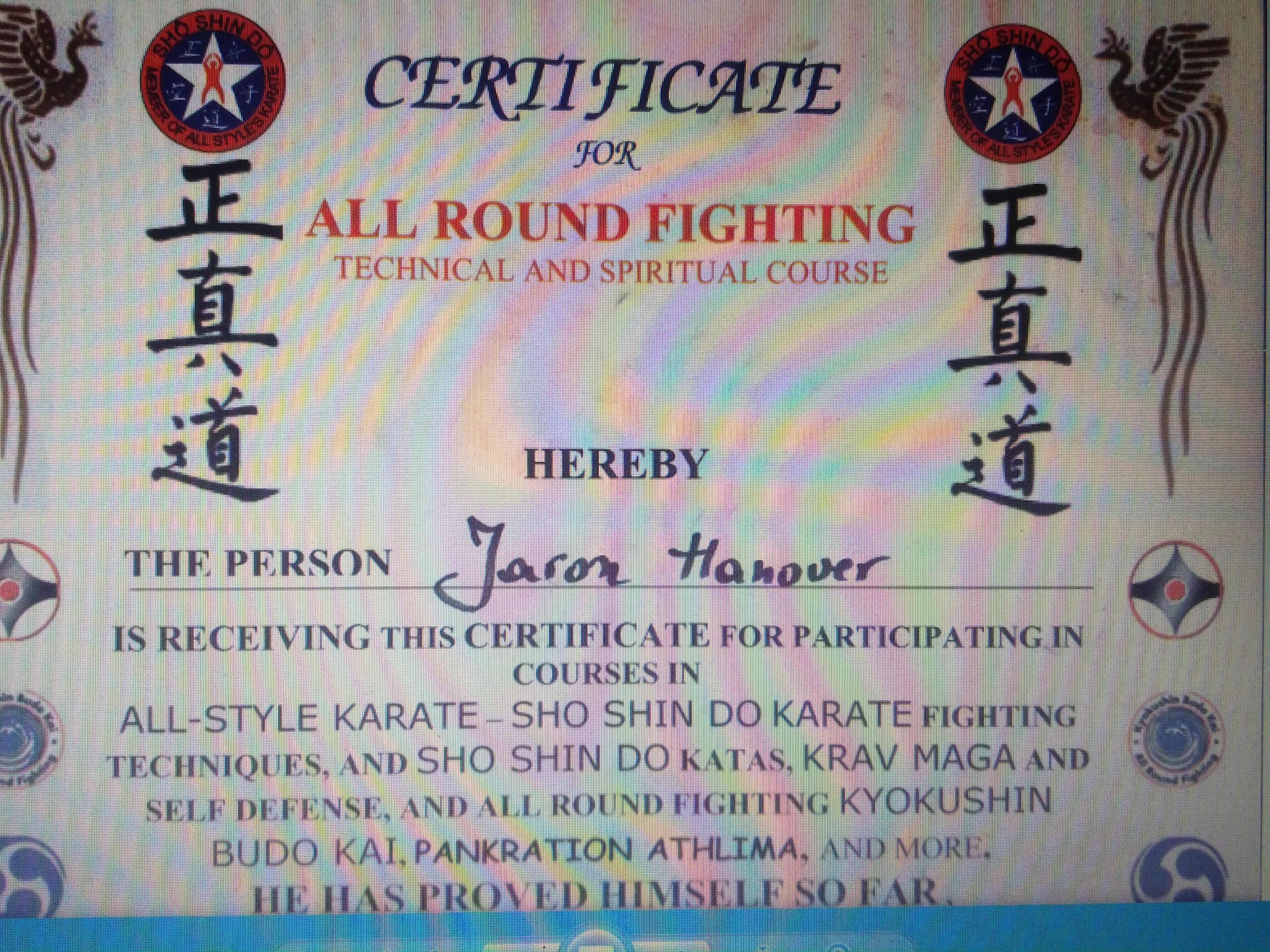 תעודת הסמכה